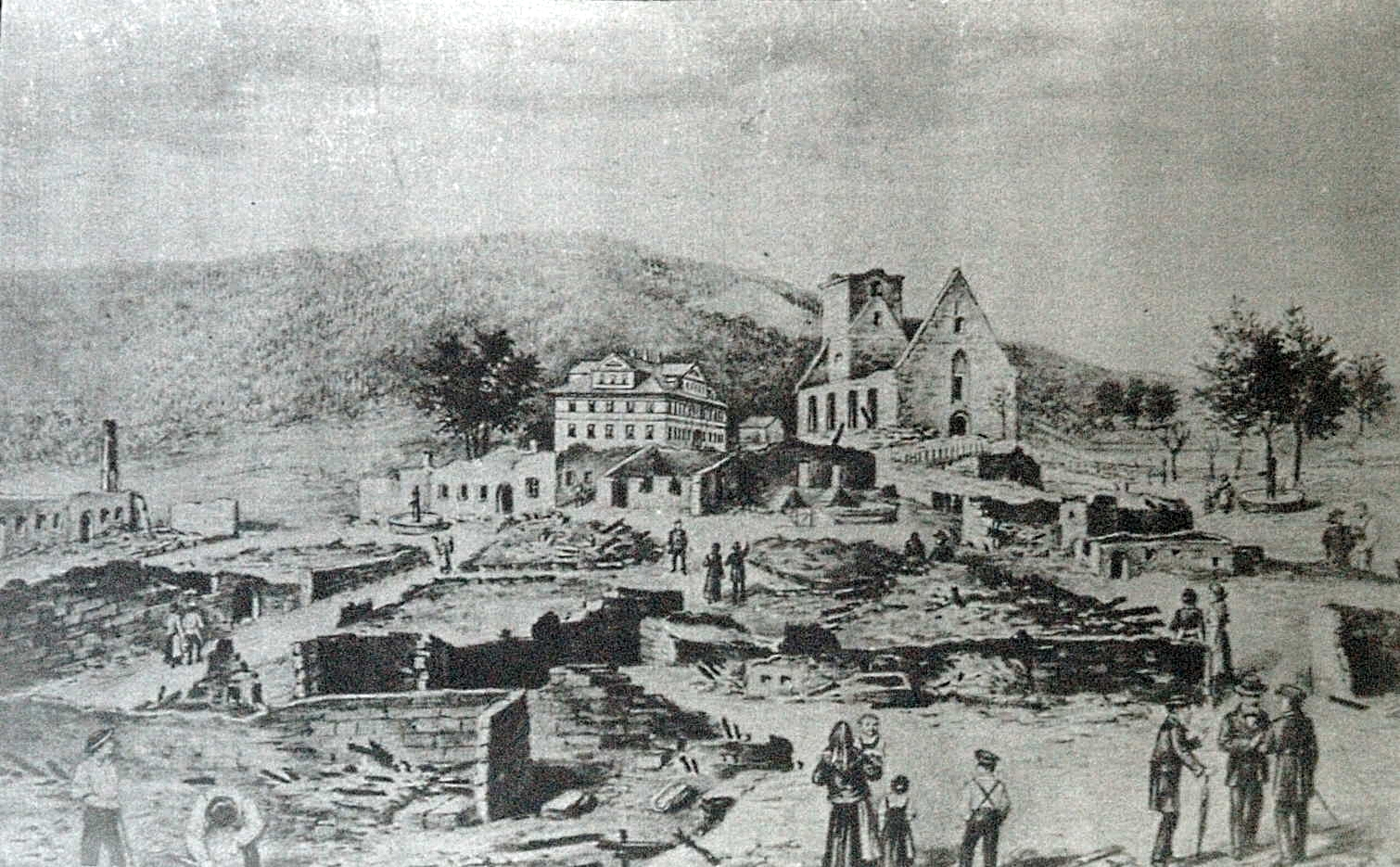 Neustadt bei Coburg nach dem Stadtbrand 1839